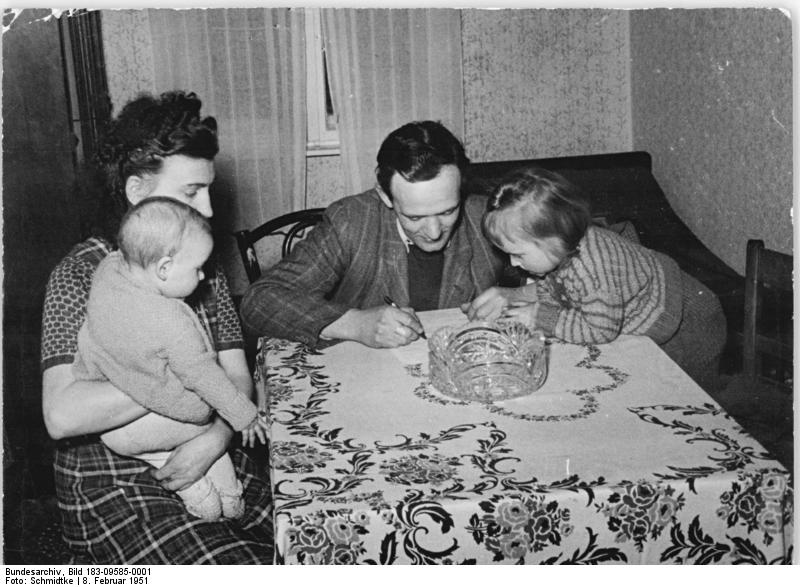 Berlin, Familienszene Illus Schmidtke 8.2.51 Demokratischer Magistrat hilft Exmittierten. Der währungsbeschädigte Westberliner Speek, der mit Frau und Kindern am 1.2.51 aus seiner Wohnung in der Oudenarder Strasse 28 (französischer Sektor) von der Westberliner Verwaltung rücksichtslos exmittiert wurde, erhielt noch am Nachmittag des gleichen Tages vom Demokratischen Magristrat eine Wohnung zugewiesen. Jetzt wohnt Familie Speek in einer soeben wiederhergestellten Wohnung in der Schliemannstrasse 24 im Bezirk Prenzlauer Berg. UBz: Vater speek liest den Mietvertarg vor. Andächtig lauscht die ganze Famiilie. Leihweise Illus Berlin W8